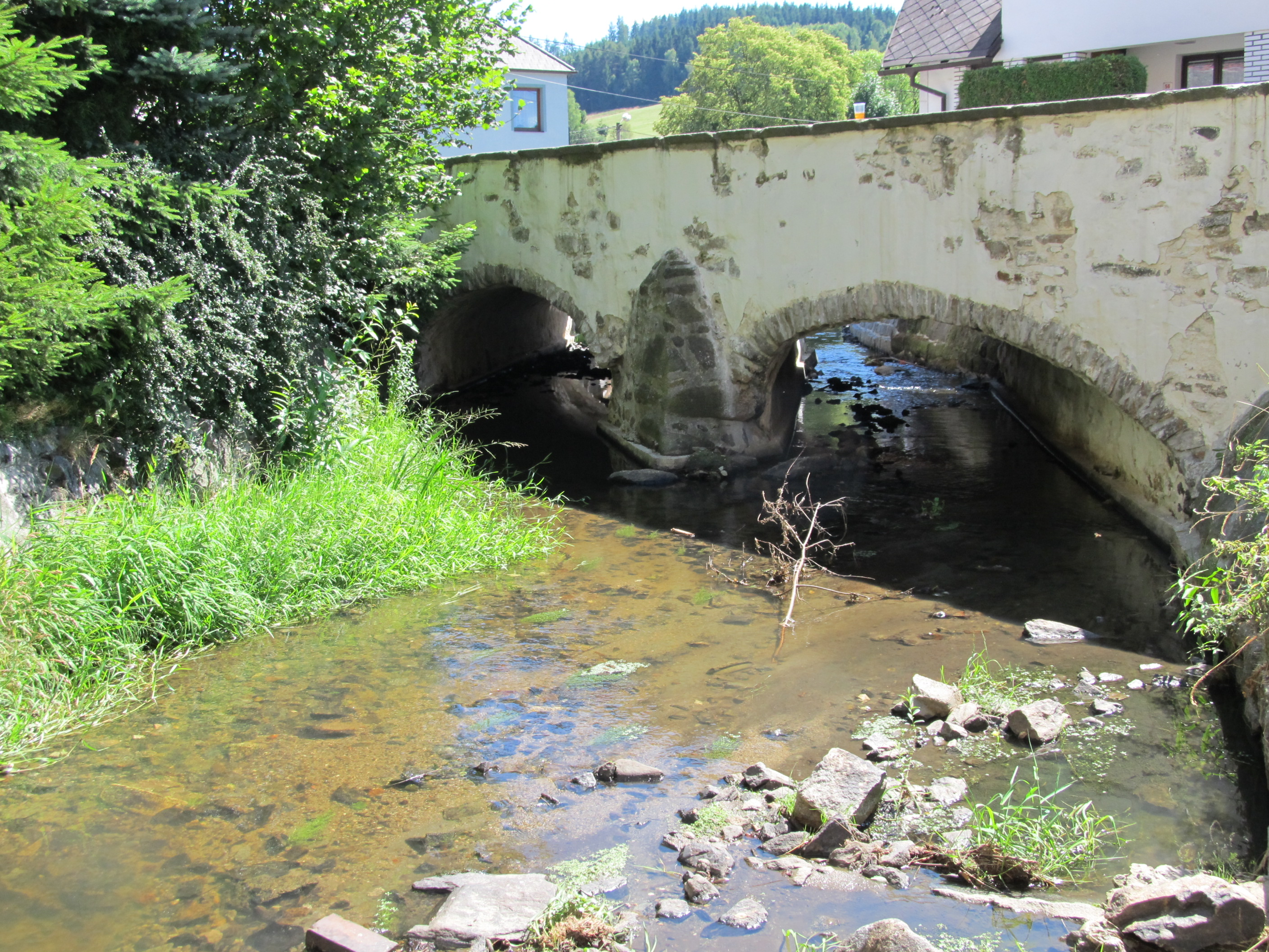 Kolinec - historický most přes Kalný potok